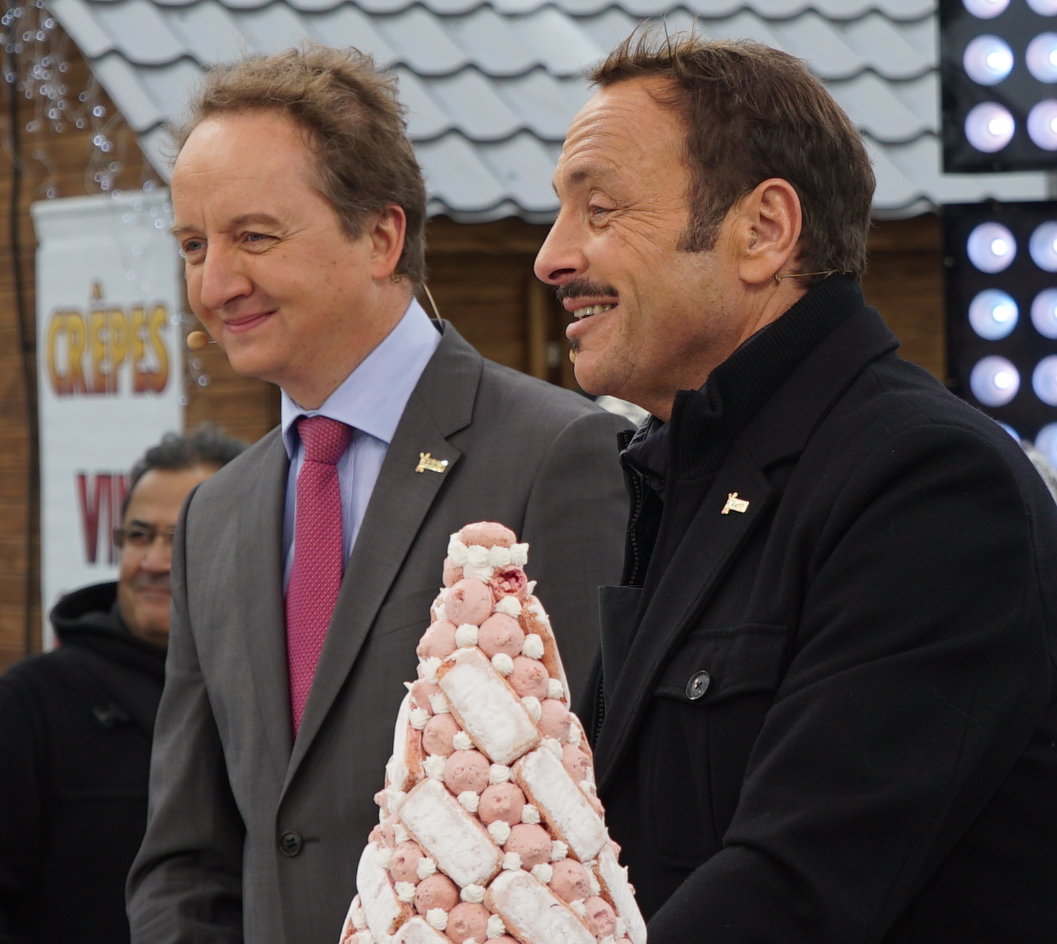 Midi en France est à Reims, Vincent Ferniot ety le directeur des bisquits Fossier.